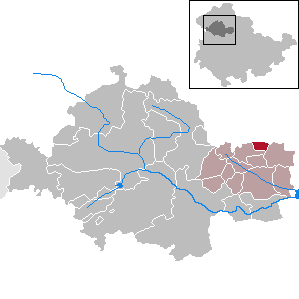 Hornsömmern in Thuringia - Unstrut-Hainich-Kreis